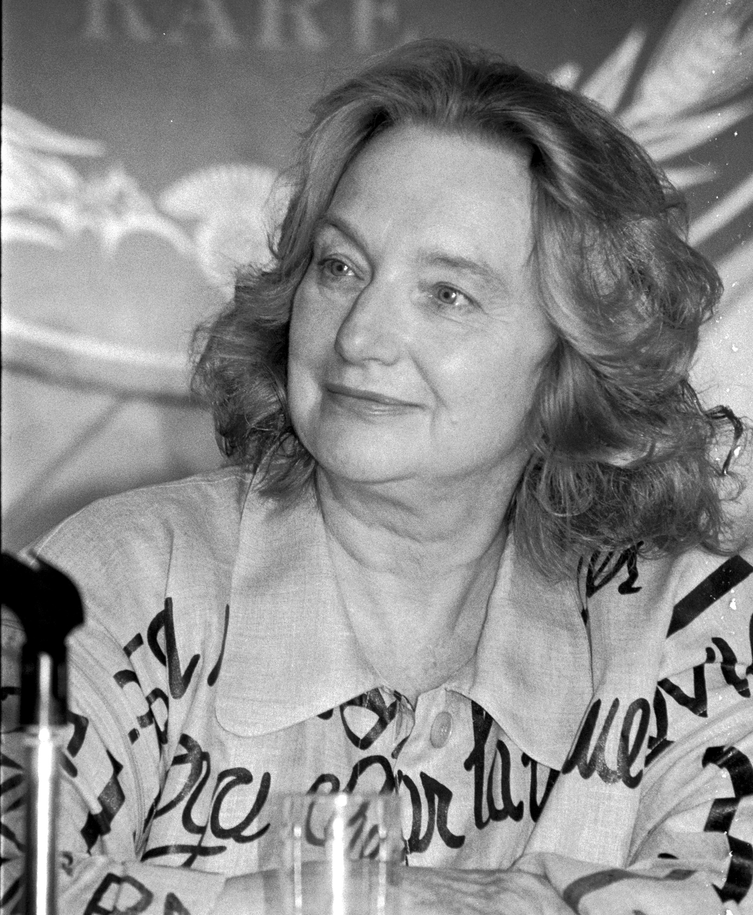 L'écrivaine Christine Arnothy à Deauville, septembre 1992.